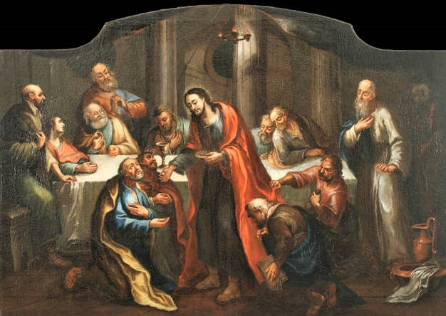 Falconer József Ferenc - Az apostolok áldozása. A budai ferences rendház padlásáról előkerült olajfestményt Görbe Katalin és Heitler András vezetése mellett Bernát-Hinkó Hanna Sára, Skladanová Friderika és Szabó Kincső újította meg.